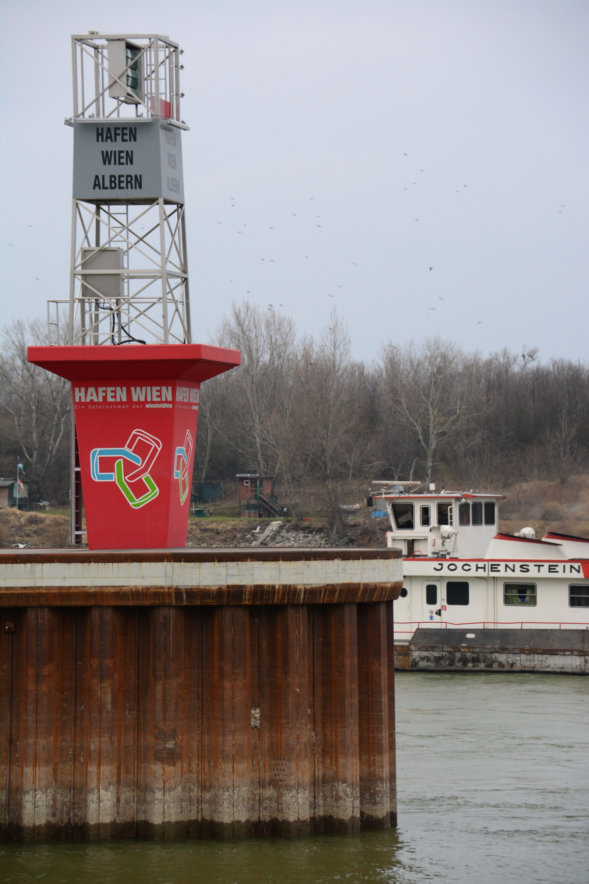 Alberner Hafen in Wien - Einfahrt